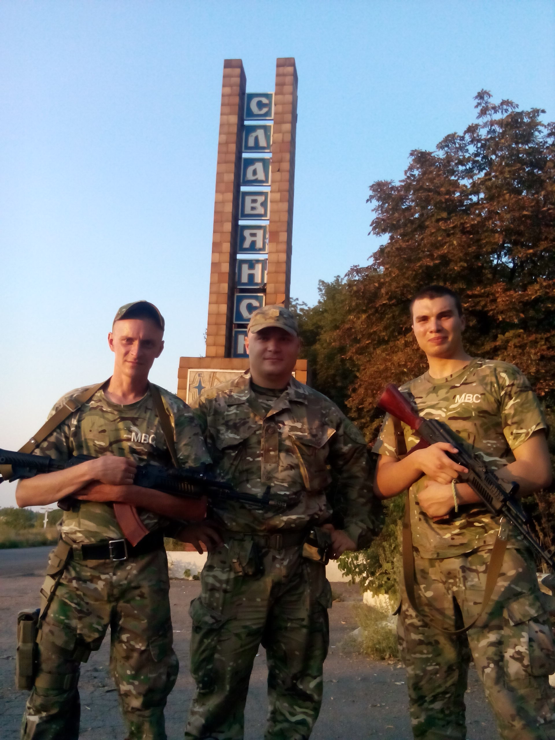 ...Харків-1